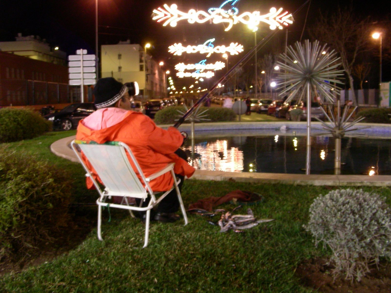 Carnaval de Isla Cristina, el absurdo suele aliarse con los disfraces. Hombre pescando en una fuente pública.